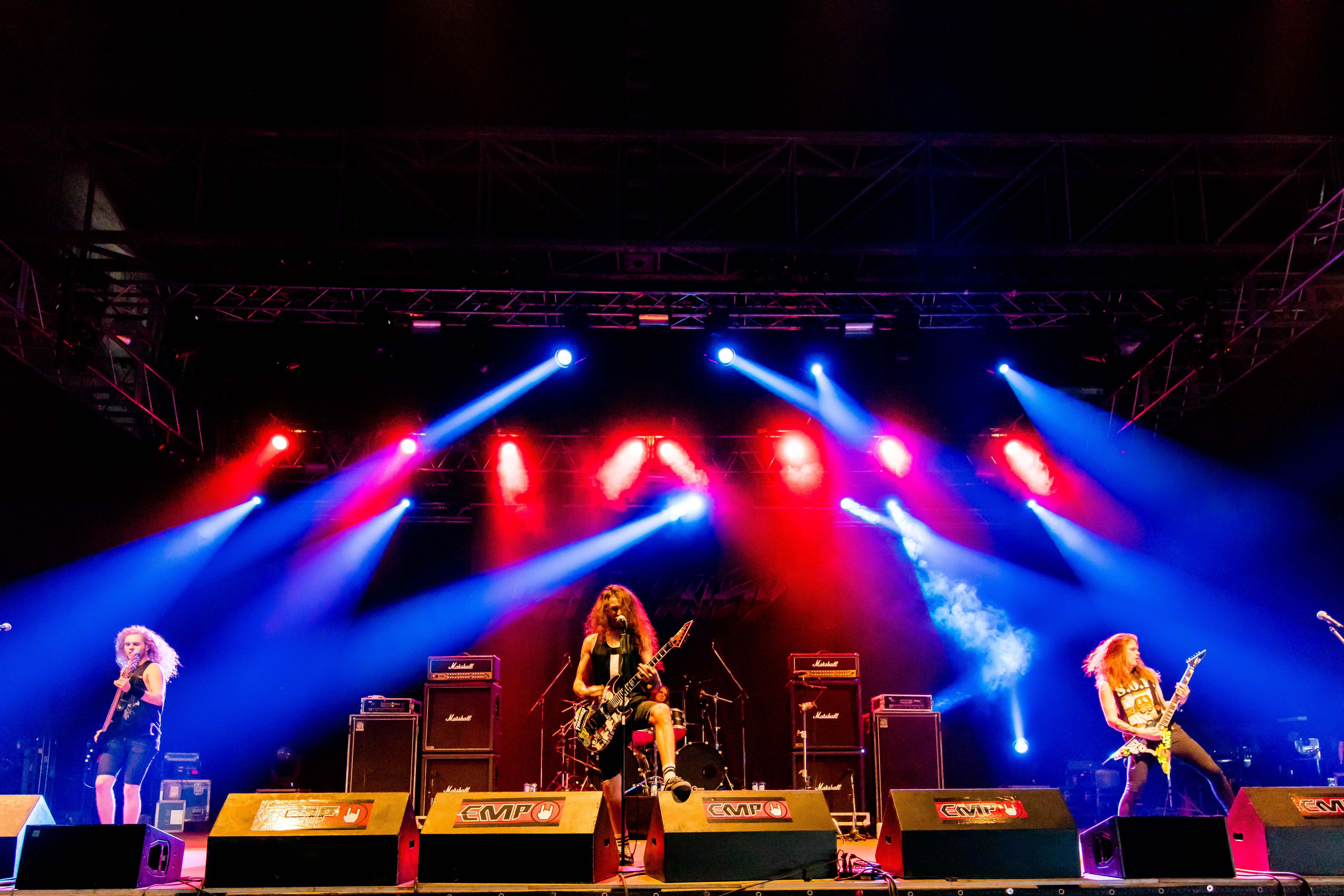 Lost Society during Summer Breeze 2016 at , Dinkelsbühl, Bayern, Germany on 2016-08-17, Photo: Sven Mandel